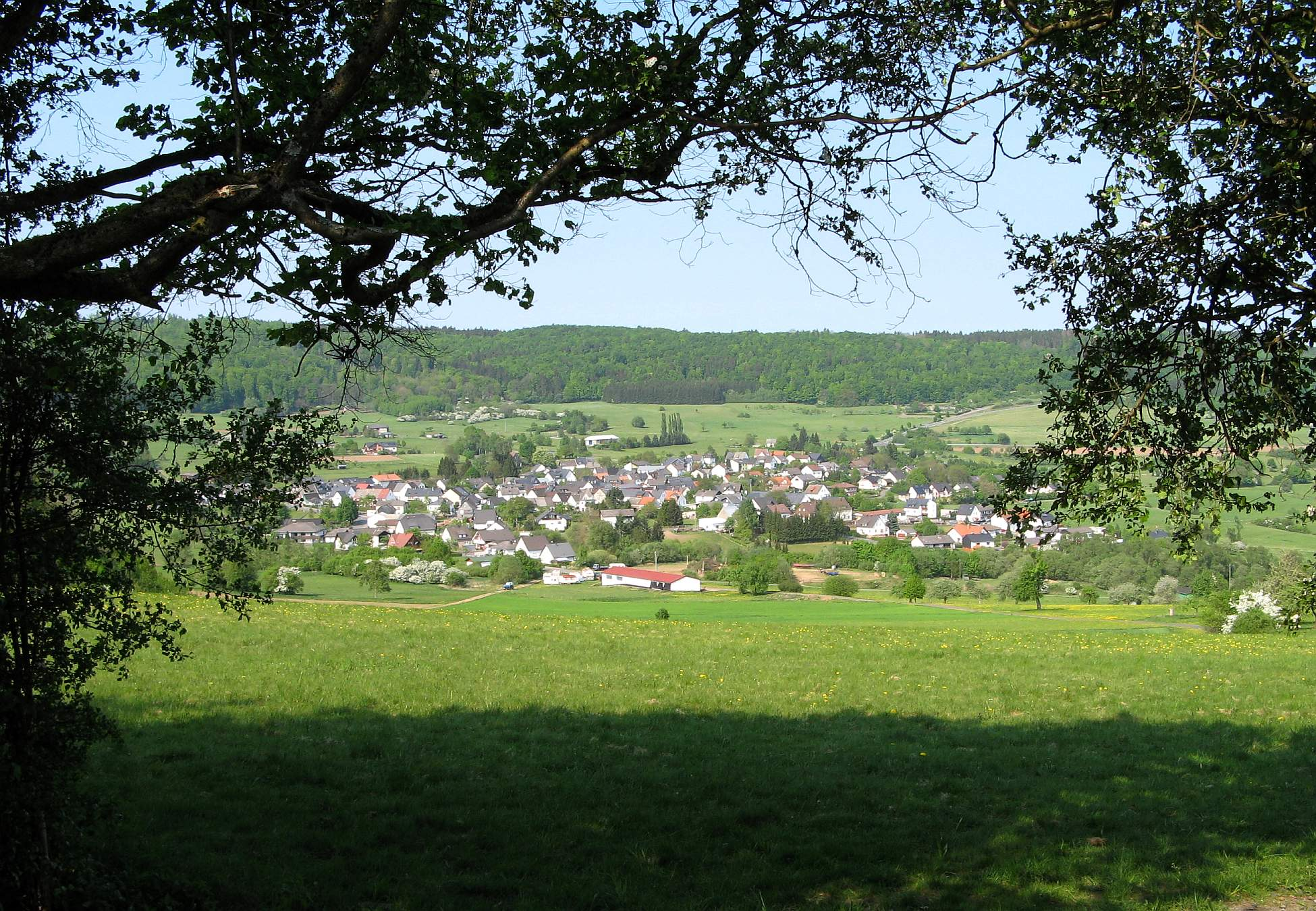 Ansicht des Dorfes Arborn, Gemeinde Greifenstein